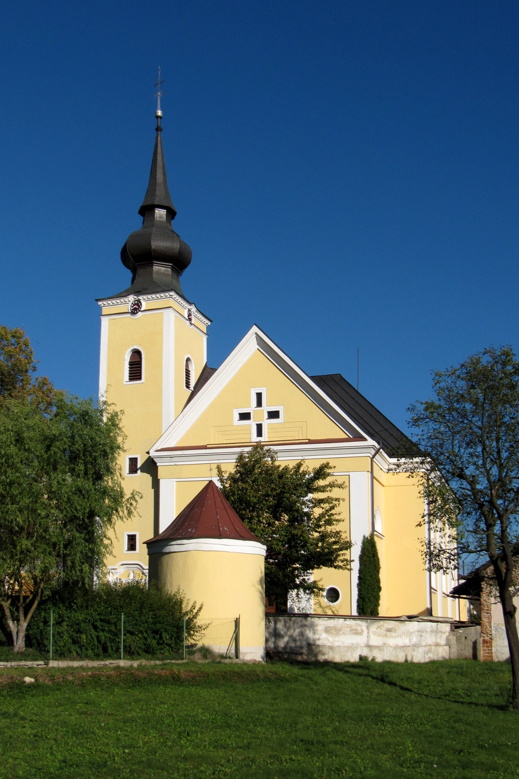 Kostol sv. Martina